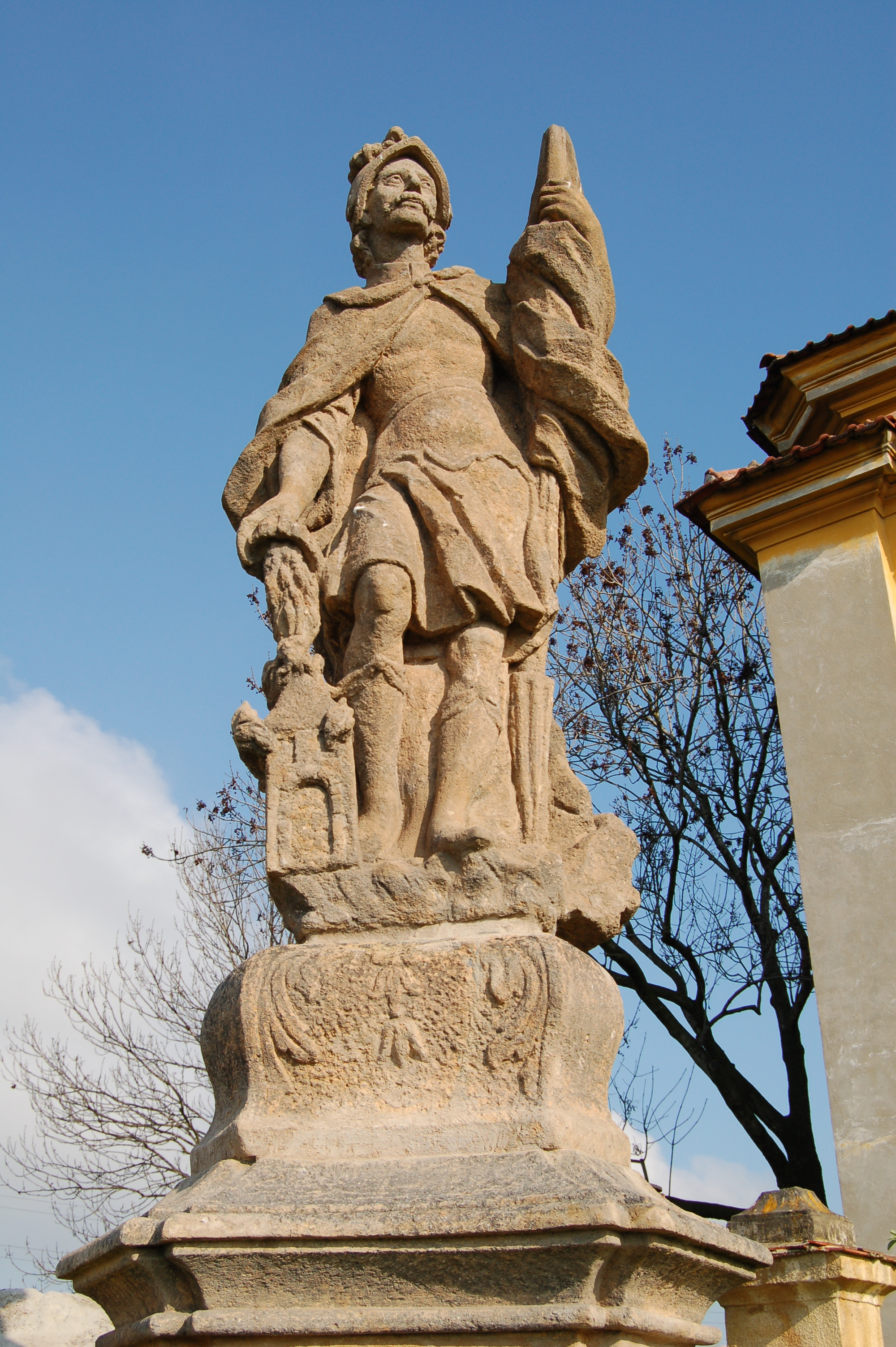 Statue von hl. Florian bei der Kirche in Vtelno (Wteln) bei Most (Brüx) in Tschechien.